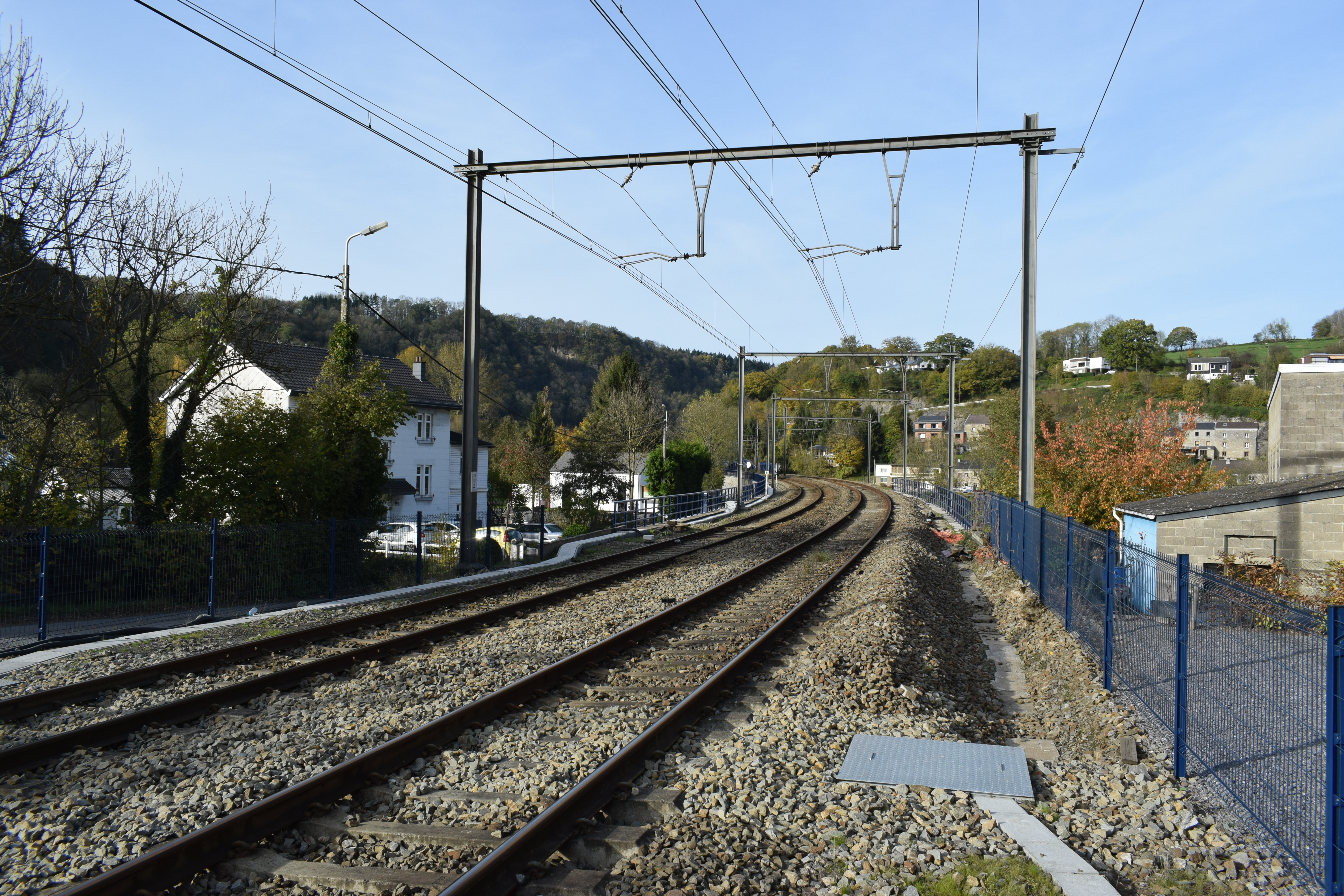 Vue des bords de l'Ourthe entre Comblain-au-Pont et Comblain-la-Tour, sur l'itinéraire du RAVeL (réseau de voies lentes pour cyclistes et piétons) en province de Liège (Belgique).